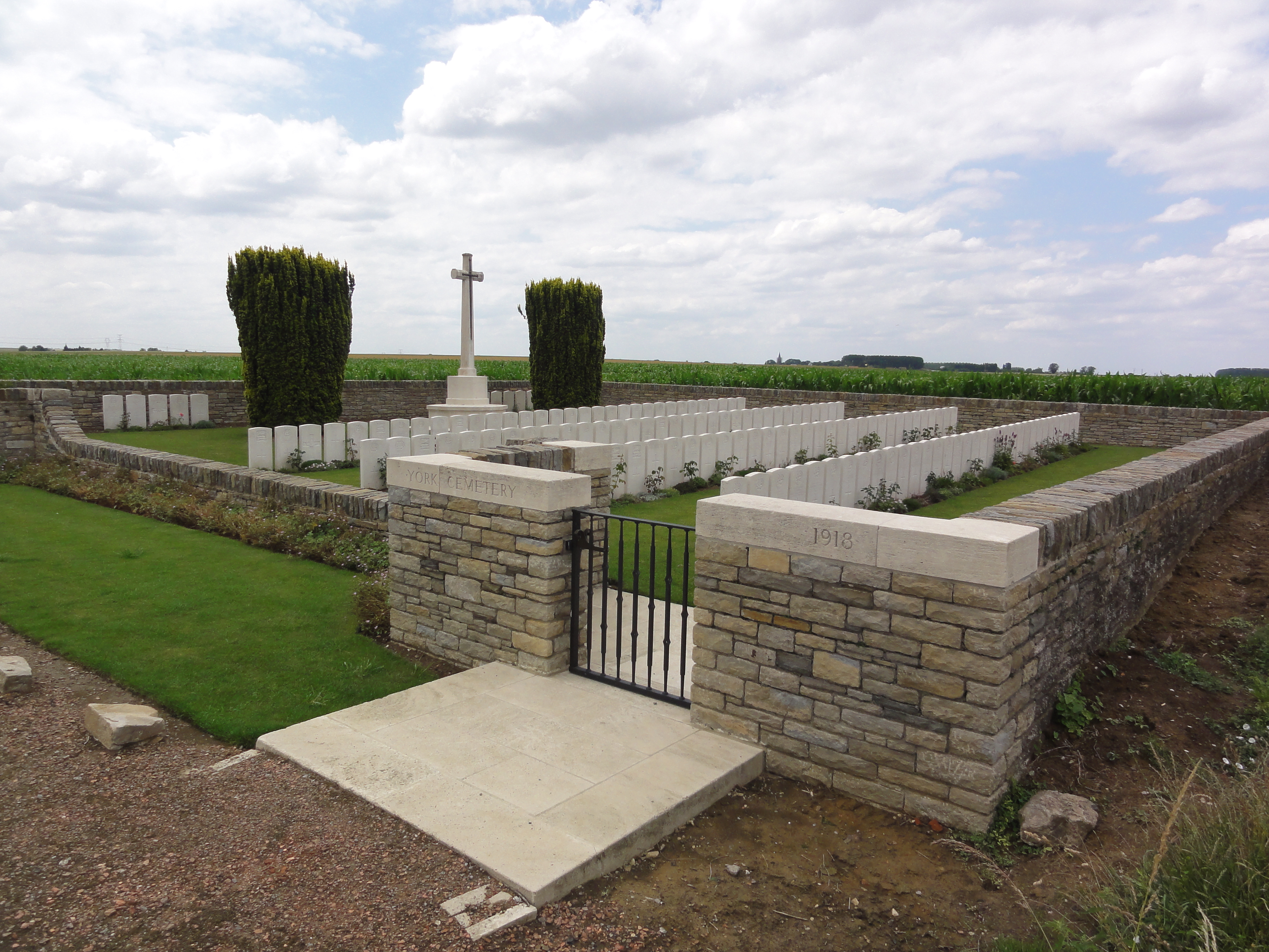 Haspres (Nord, Fr) York Cemetery 1918 CWGC